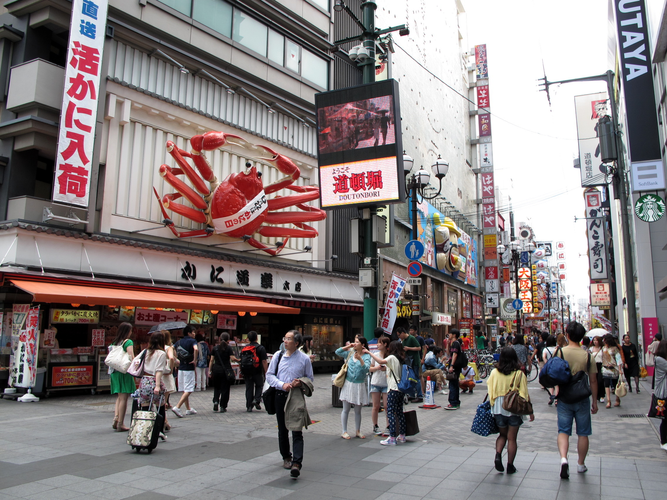 Dotonbori Street view_